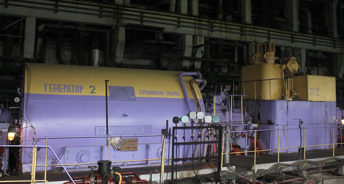 НиГРЭС. Турбогенератор №2